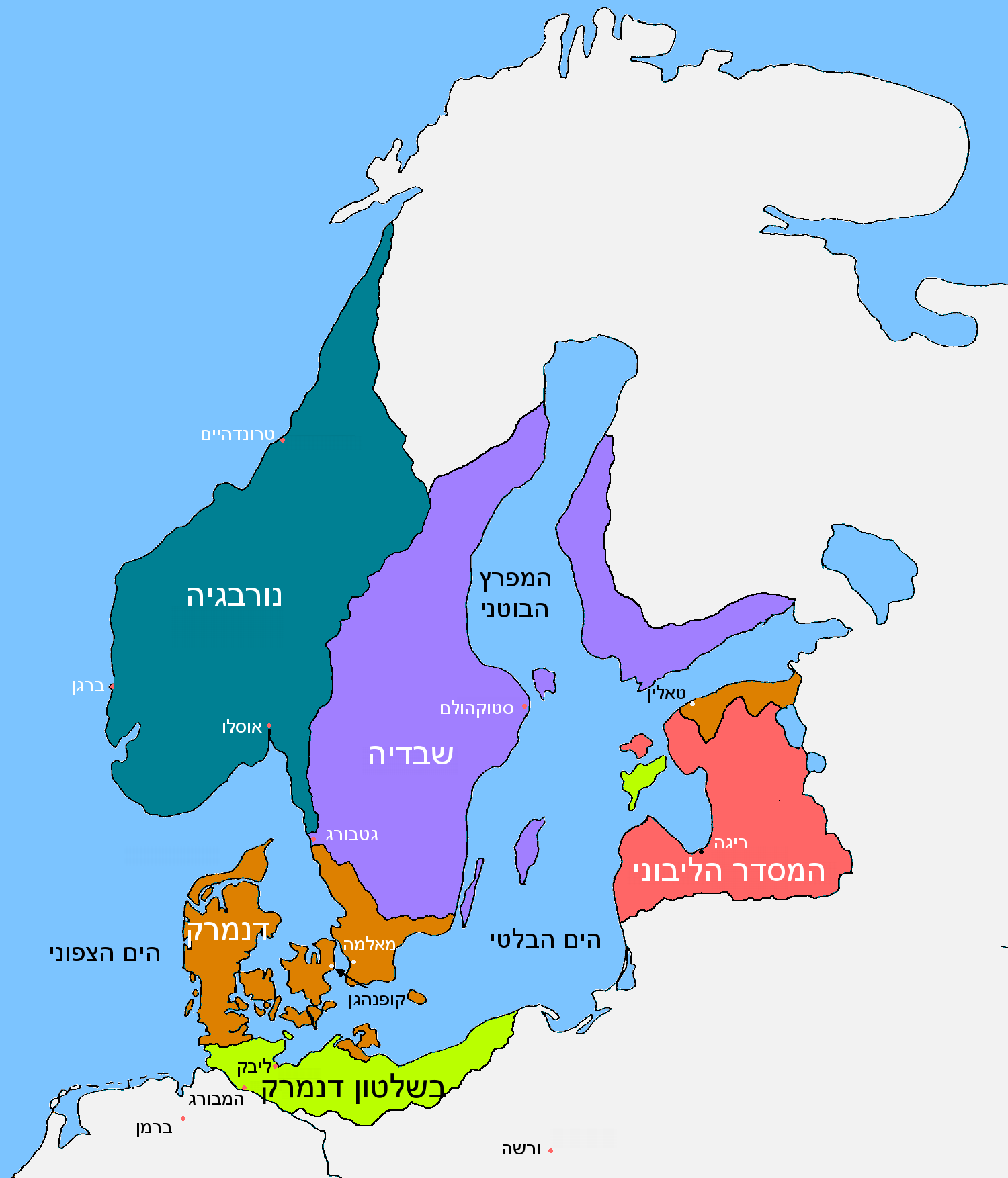 סקנדינביה 1219